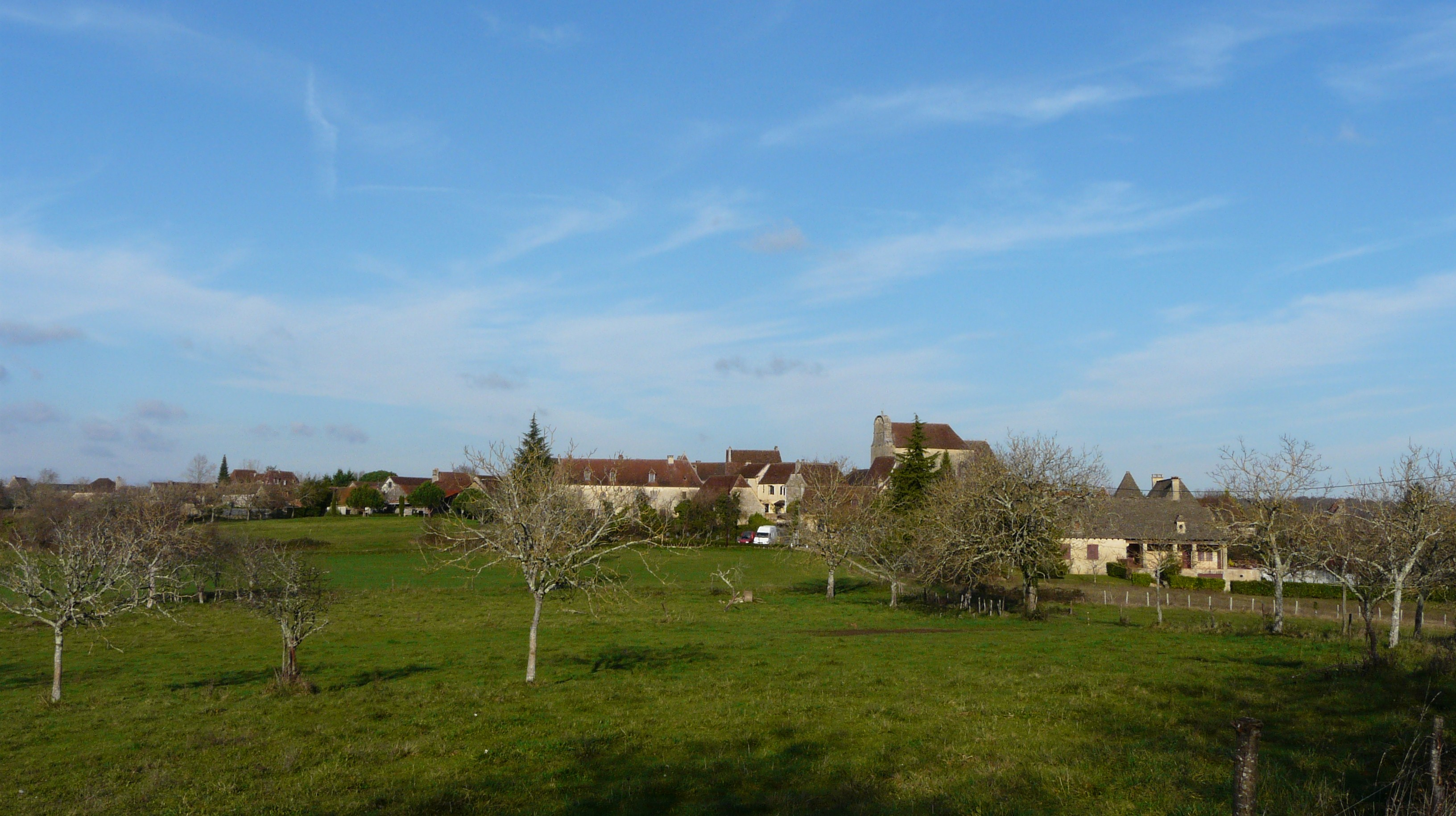 Panorama sur le bourg de Fanlac vu depuis le GR 36 au sud-sud-ouest, Dordogne, France.